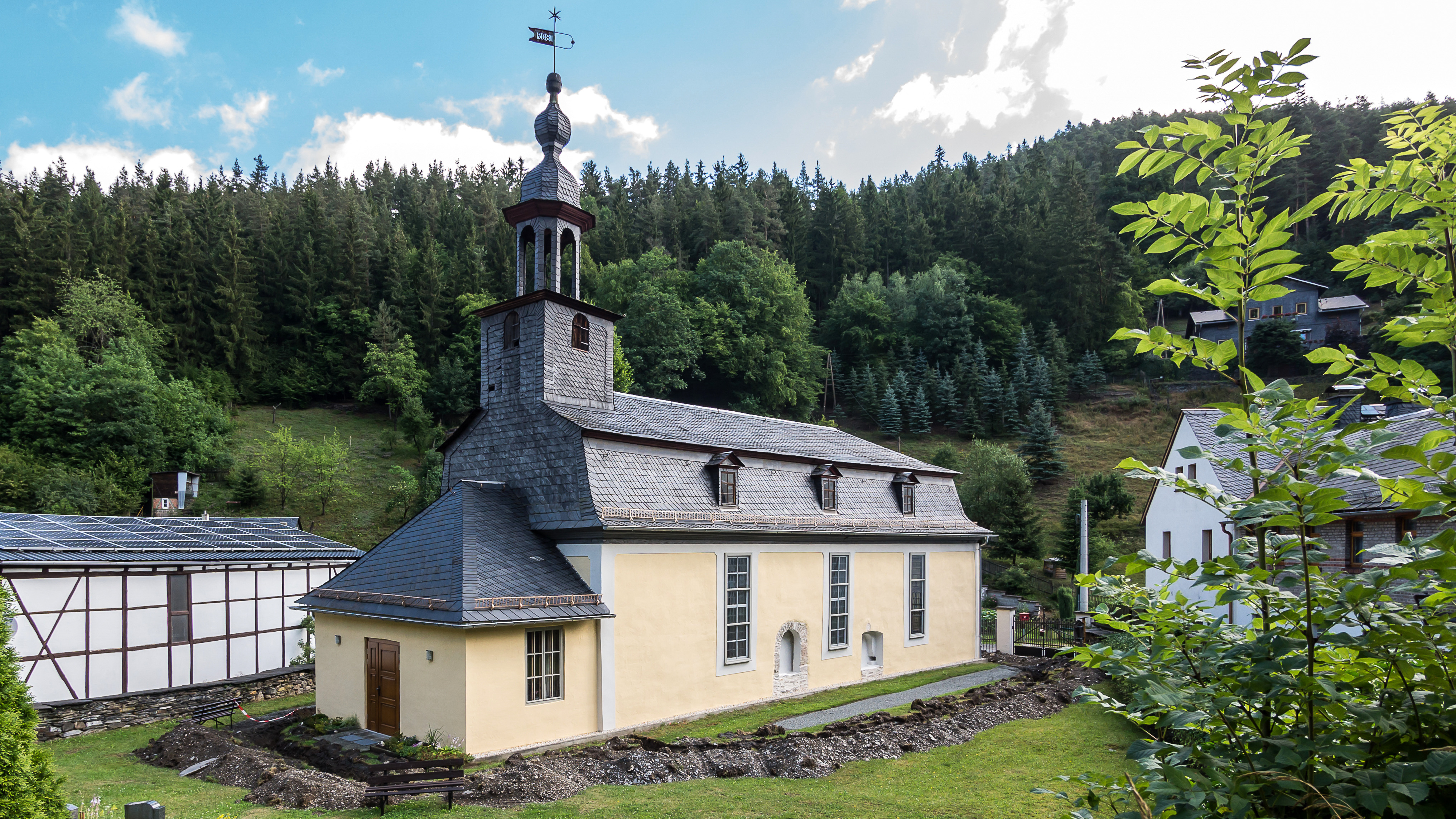 FFH-Gebiet 5434-302 Kirche Reichenbach DE-TH 1 ; Wochenstube der Kl. Hufeisennase (Rhinolophus hipposideros) im Dachboden der Kirche, Jagdhabitate und Satellitenquartiere in der Nähe, funktionaler Zusammenhang auch zu den(Schieferbrüchen Probstzella) mit zugehörigen Winterquartieren.